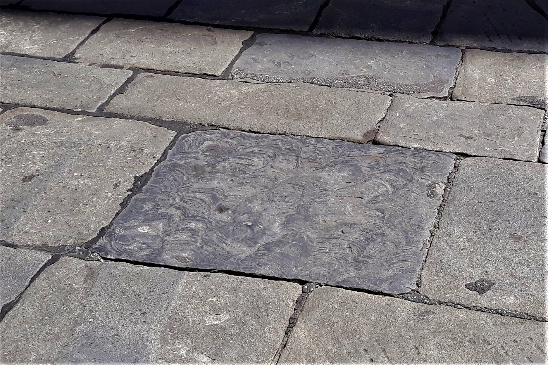 Piazza Banchi - una pietra più scura al centro della piazza - forse a memoria di un rogo